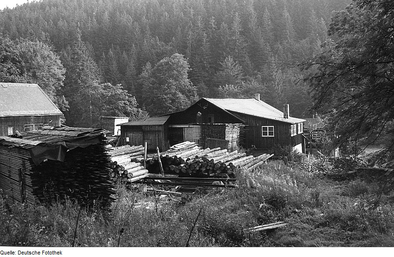 Original image description from the Deutsche FotothekHermsdorf/Erzgeb.-Seyde. Herklotzmühle auf Rehefeld zu